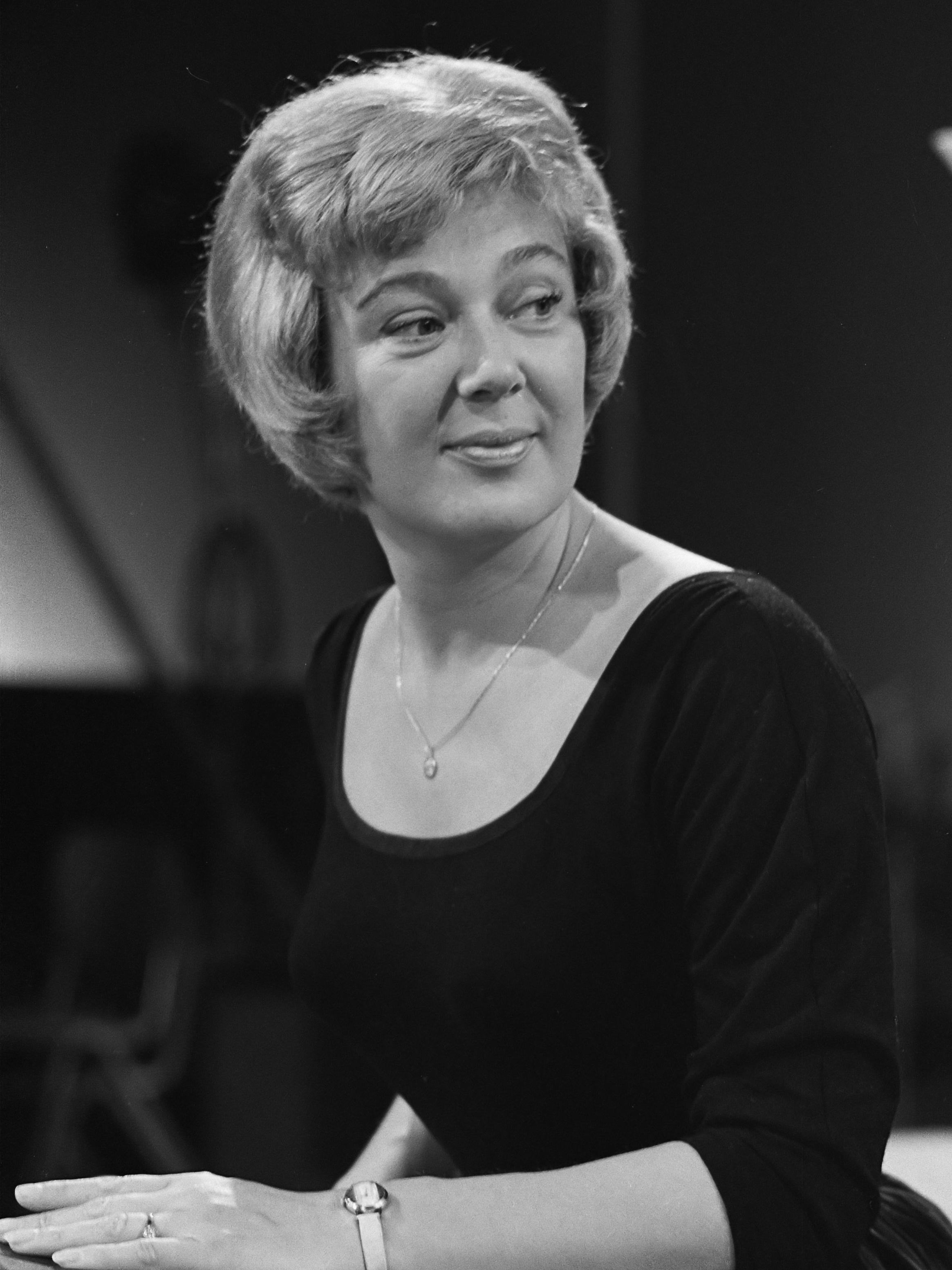 Firato 1963 . BRT bracht programma "Evergreens". Jo Leemans 16 september 1963